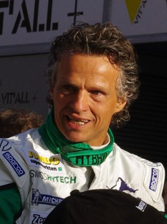 Le Mans 24 Hours 2011 Drivers' Parade